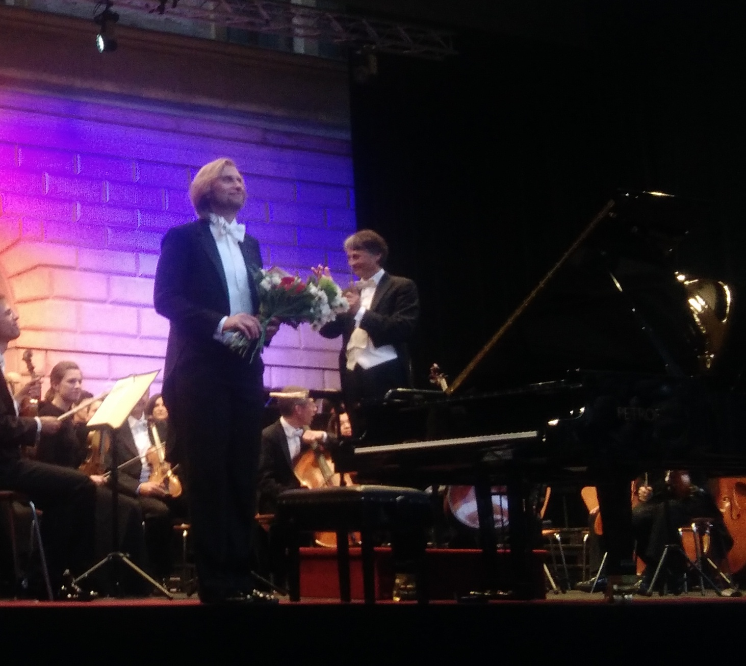 Smetanova Litomyšl 2018. Litomyšl, Česká republika.